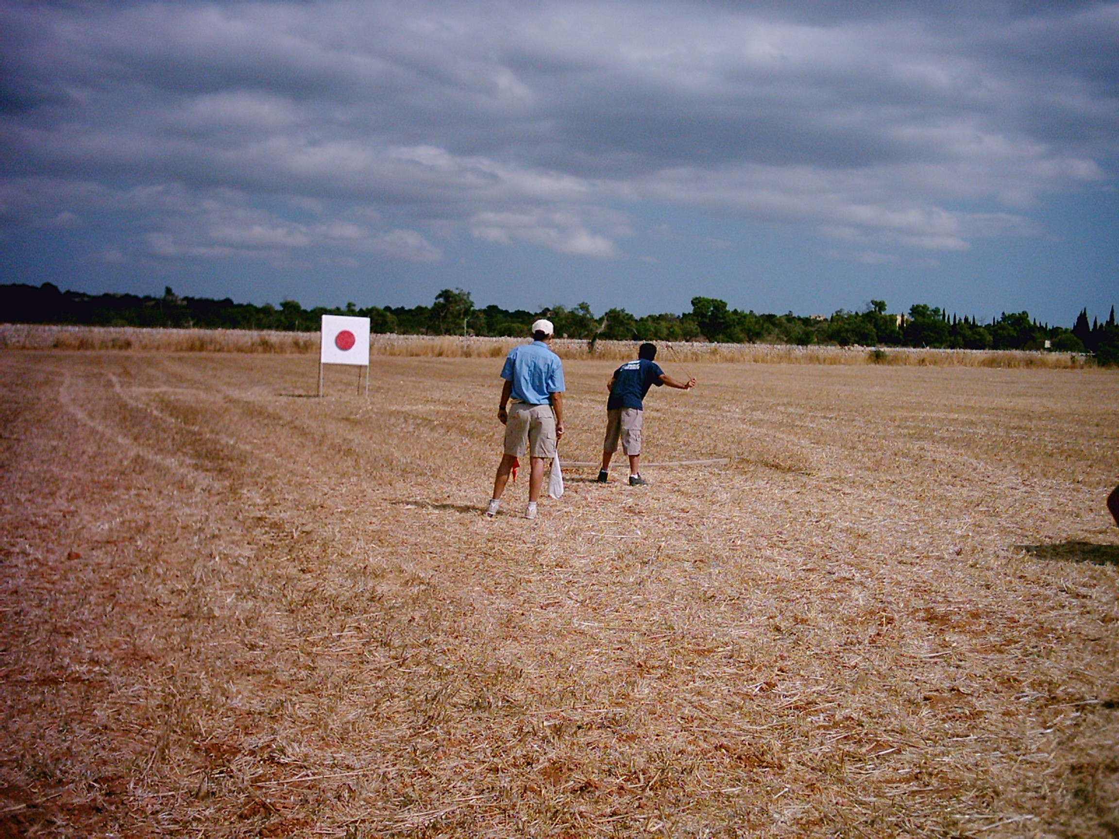 Tir amb la fona, a s'Aranjassa, Mallorca